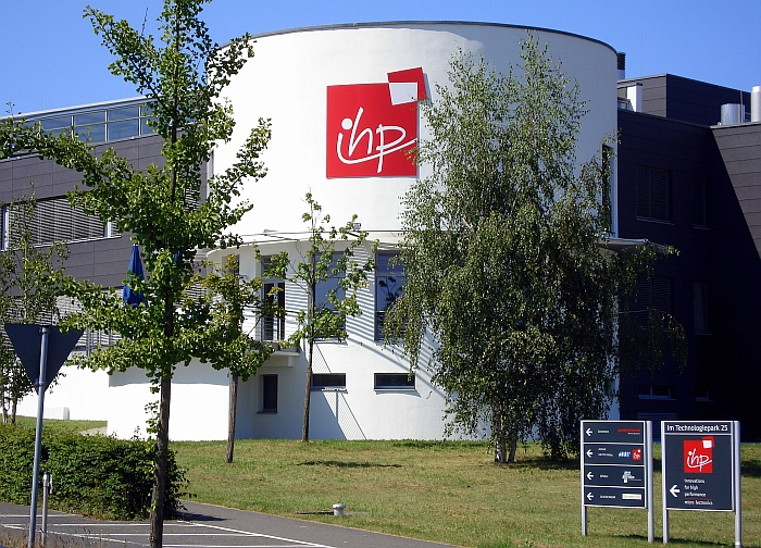 IHP-Gebäude im Technologiepark Ostbrandenburg